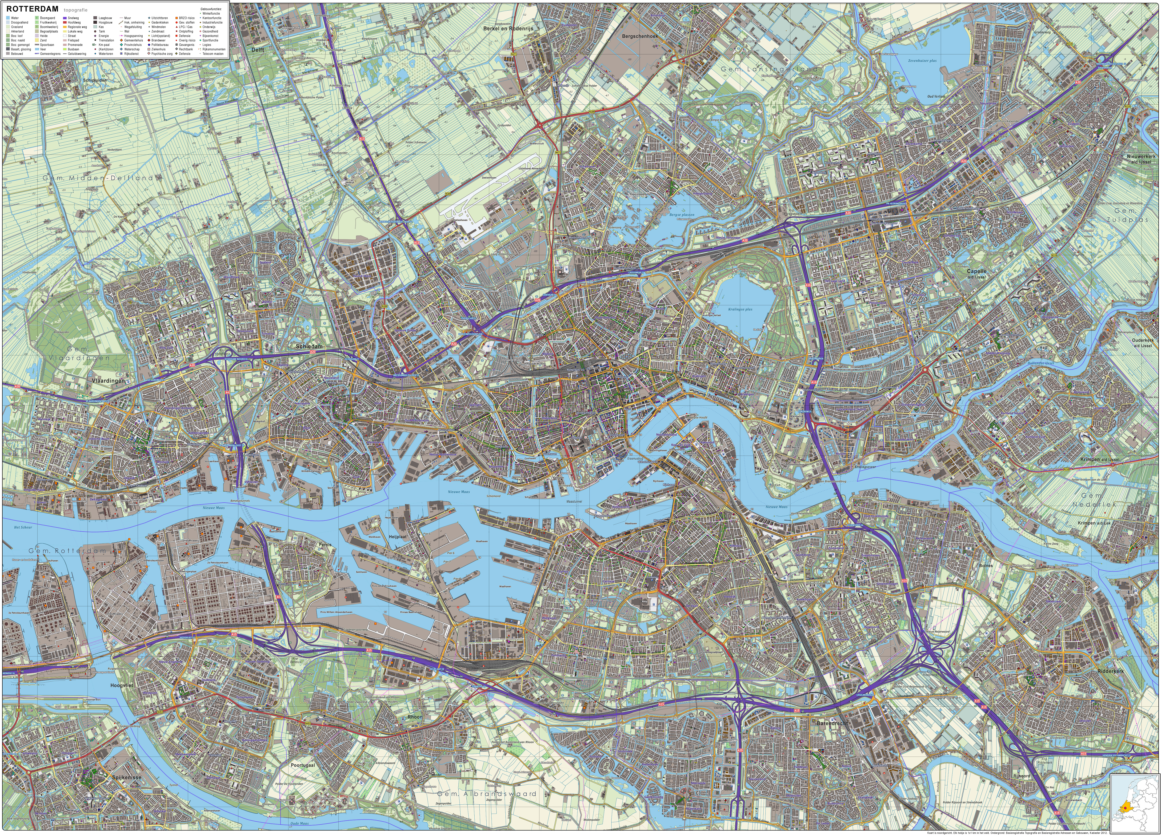 Topografisch beeld van Rotterdam en omgeving. Op basis van de GML open geodata van de BRT/Top10NL (basisregistratie Topografie, Kadaster 2012), vrijgegeven door Kadaster op 30-11-2012 onder de Creative Commons BY licentie. Gebouwvlakken vanuit Open Geodata BAG extract (december 2012). Samenstelling en kleurenschema: Jan-Willem van Aalst, met QuantumGIS en Photoshop.